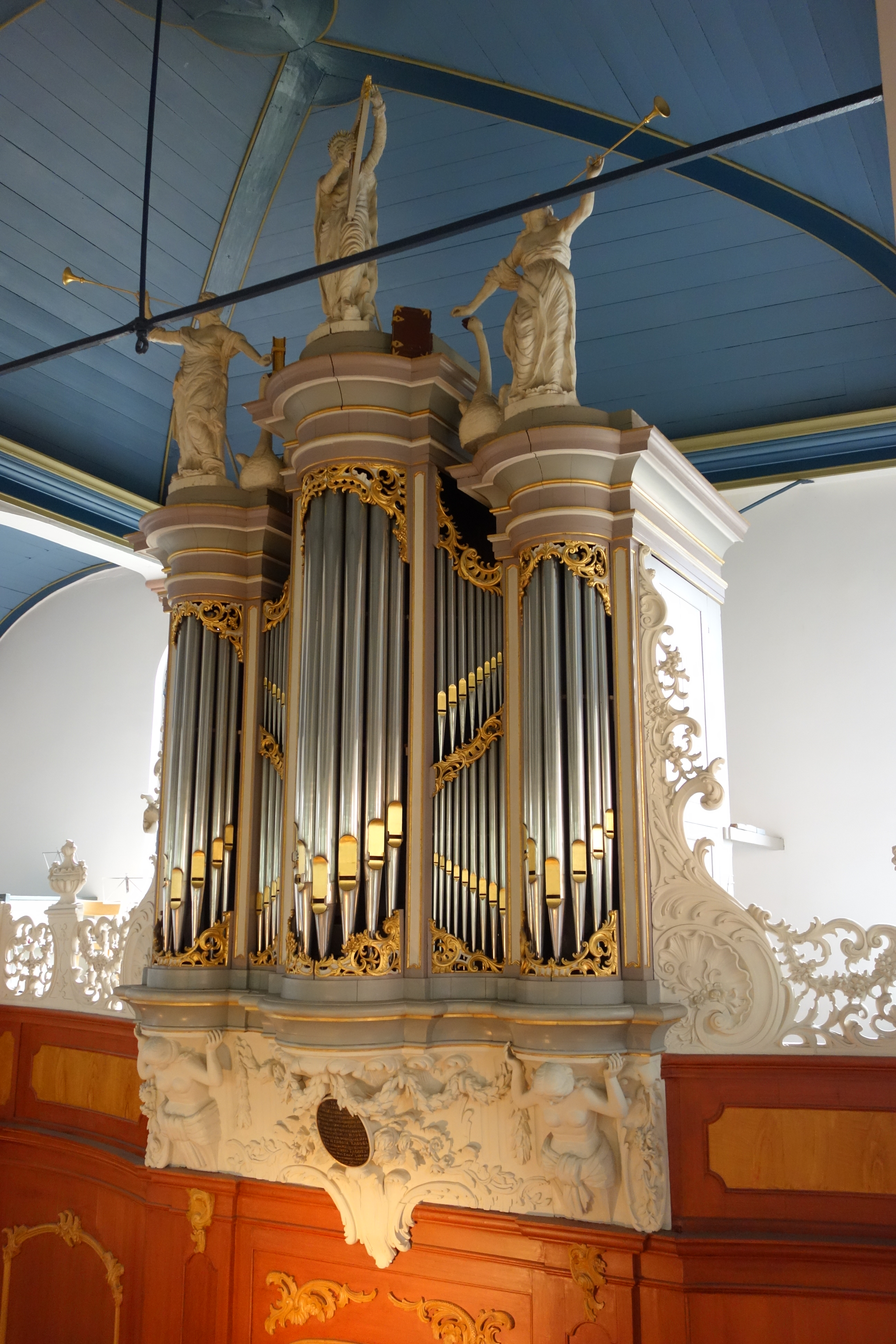 Orgel in de Lutherse kerk van Hoorn. Gemaakt door Pieter Müller. Het orgel staat op de plek waar van origine het opzetstuk van de herenbank stond.